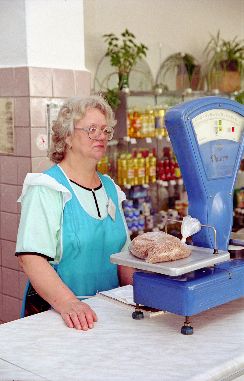 Магазин в правом крыле заводоуправления ОАО «Компания Славич», под столовой. Магазином владело управление рабочего снабжения (оно же отдел рабочей торговли). Продавщица Галина Алексеевна Никифорова взвешивает гречневую крупу. Галина Алексеевна Никифорова начала работать в 1965 году на фабрике киноплёнки в отделении массовой печати, в 1974 году работала в цехе магнитных лент, в 1984 году перешла в торговлю. Город Переславль-Залесский.